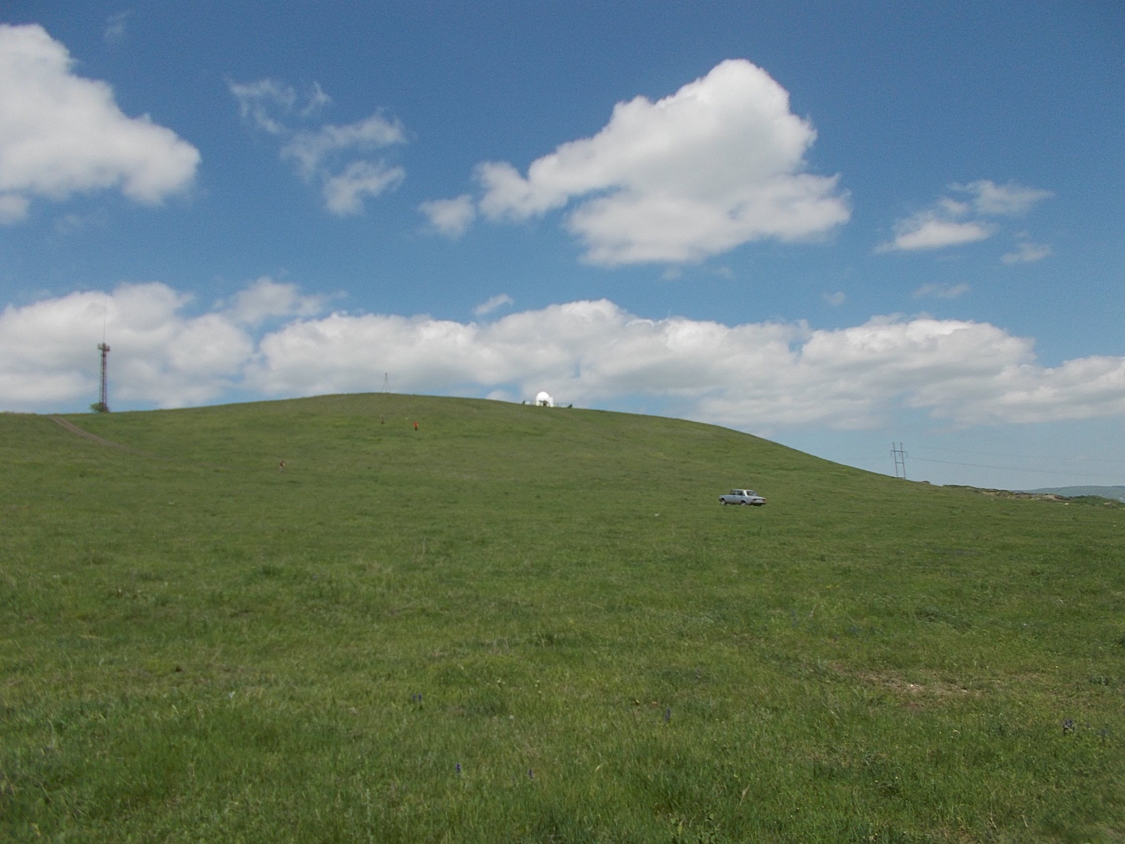 Мавзолей «Борга-Каш» (Республика Ингушетия, Карабулак, севернее села Плиево, на холме Гора Шейха)